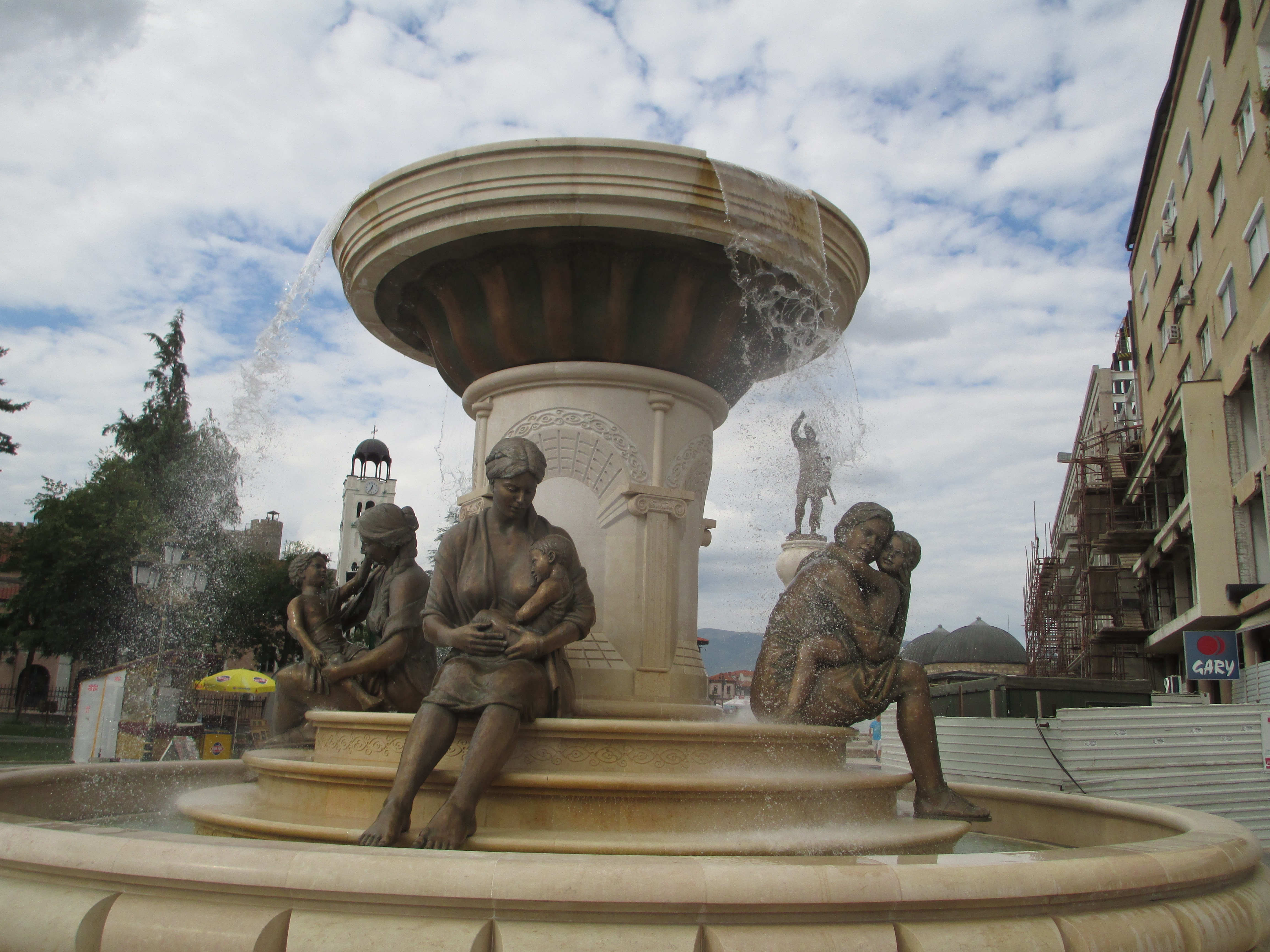 מזרקת אלכסנדר הגדול ואימו אולימפיאס בסקופיה